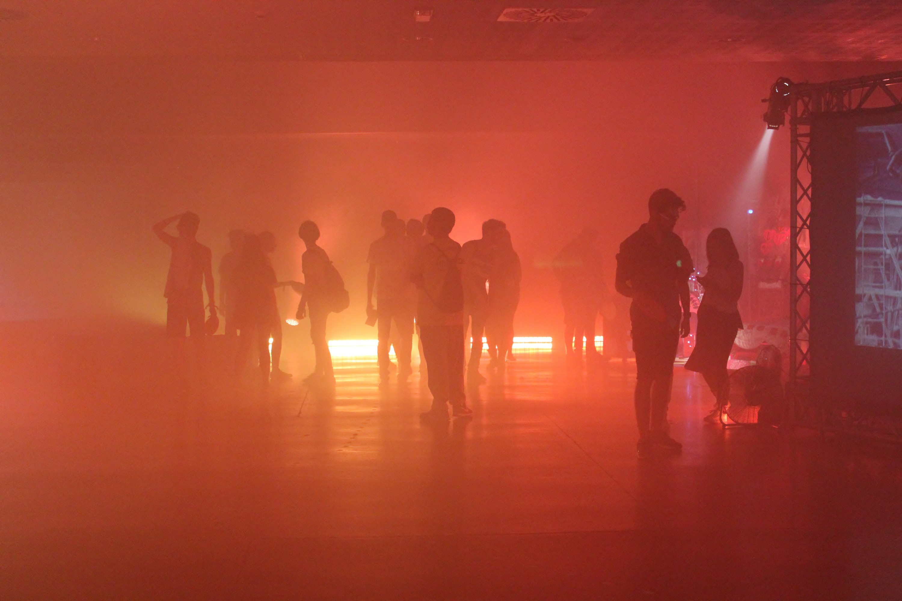 Festival internacional de acción artística SOS 4.8, celebrado en la ciudad de Murcia, España. Fotografía del espacio SOS 4.8 Arte, año 2015.